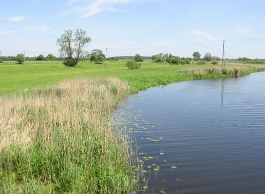 Hohennauener Rhin, ein (ehemaliger) Seitenarm des eigentlichen Rhin im durch die Ländchen Friesack und Rhinow vom Rhinluch abgetrennten, dafür aber vom Lauf der Havel berührten Hohennauenschen Bruch, vor der Mündung in den Hohennauener/Ferchesarer See bei Wassersuppe, Brandenburg fotografiert im Mai 2005 von Lienhard Schulz